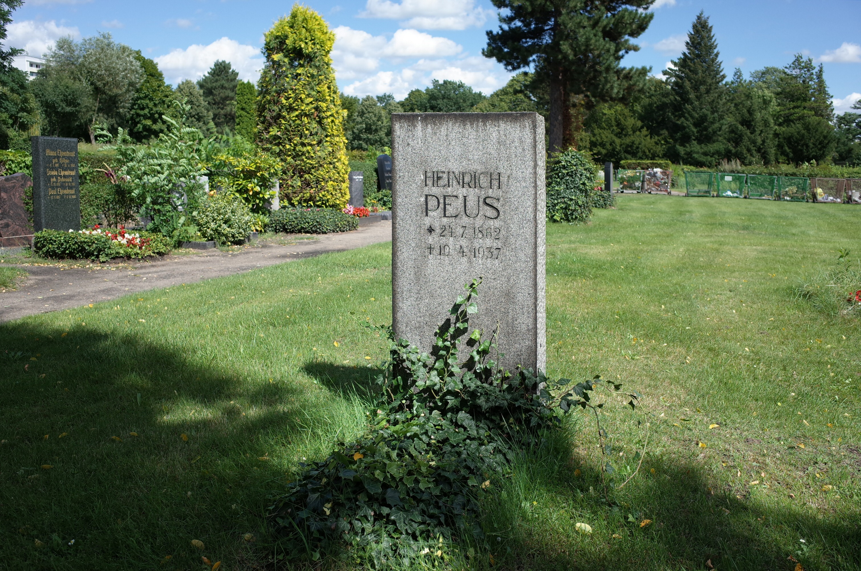 Ruhestätte von Heinrich Peus in Dessau auf dem Friedhof 1.